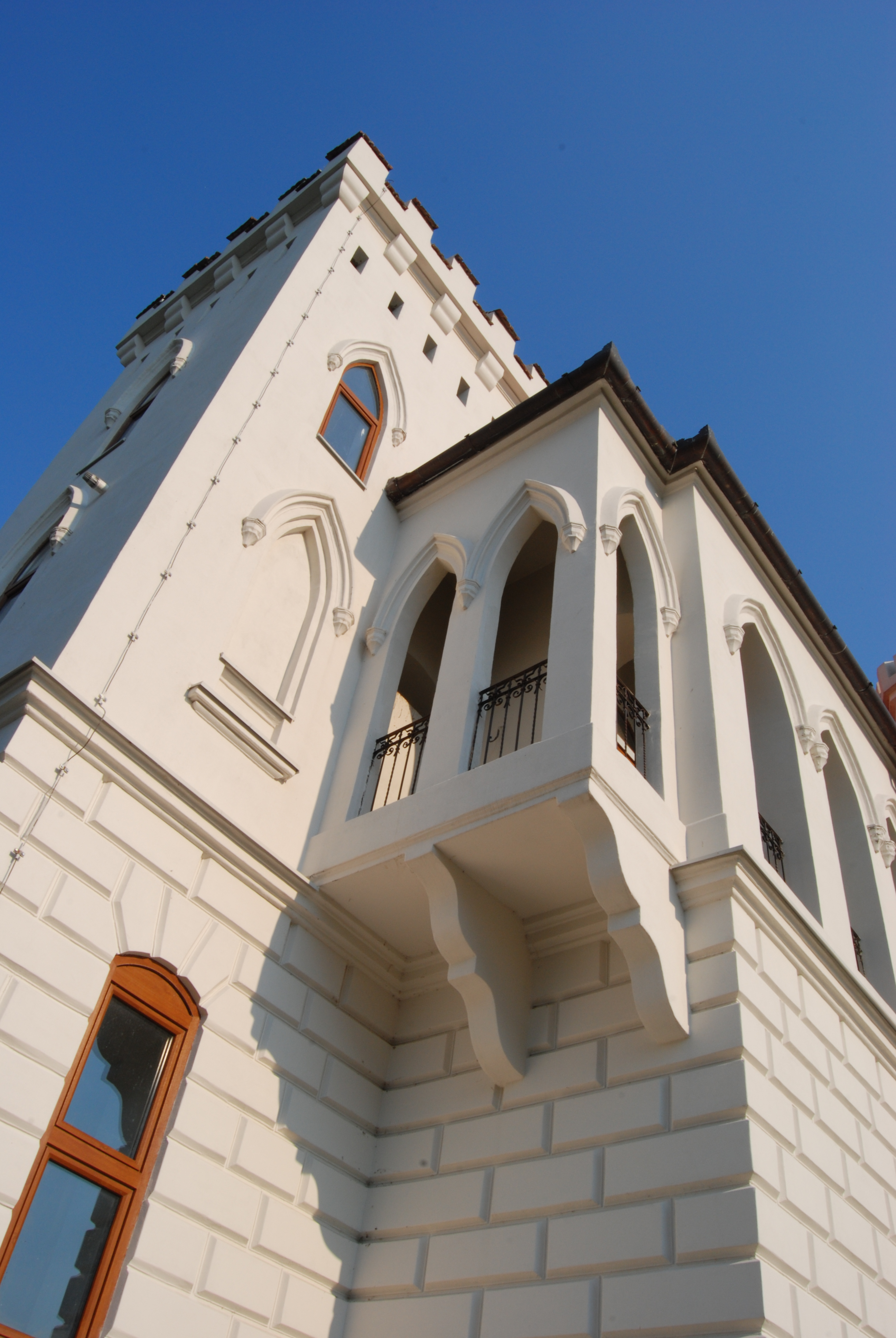 Дворац Капетаново код Старог Леца